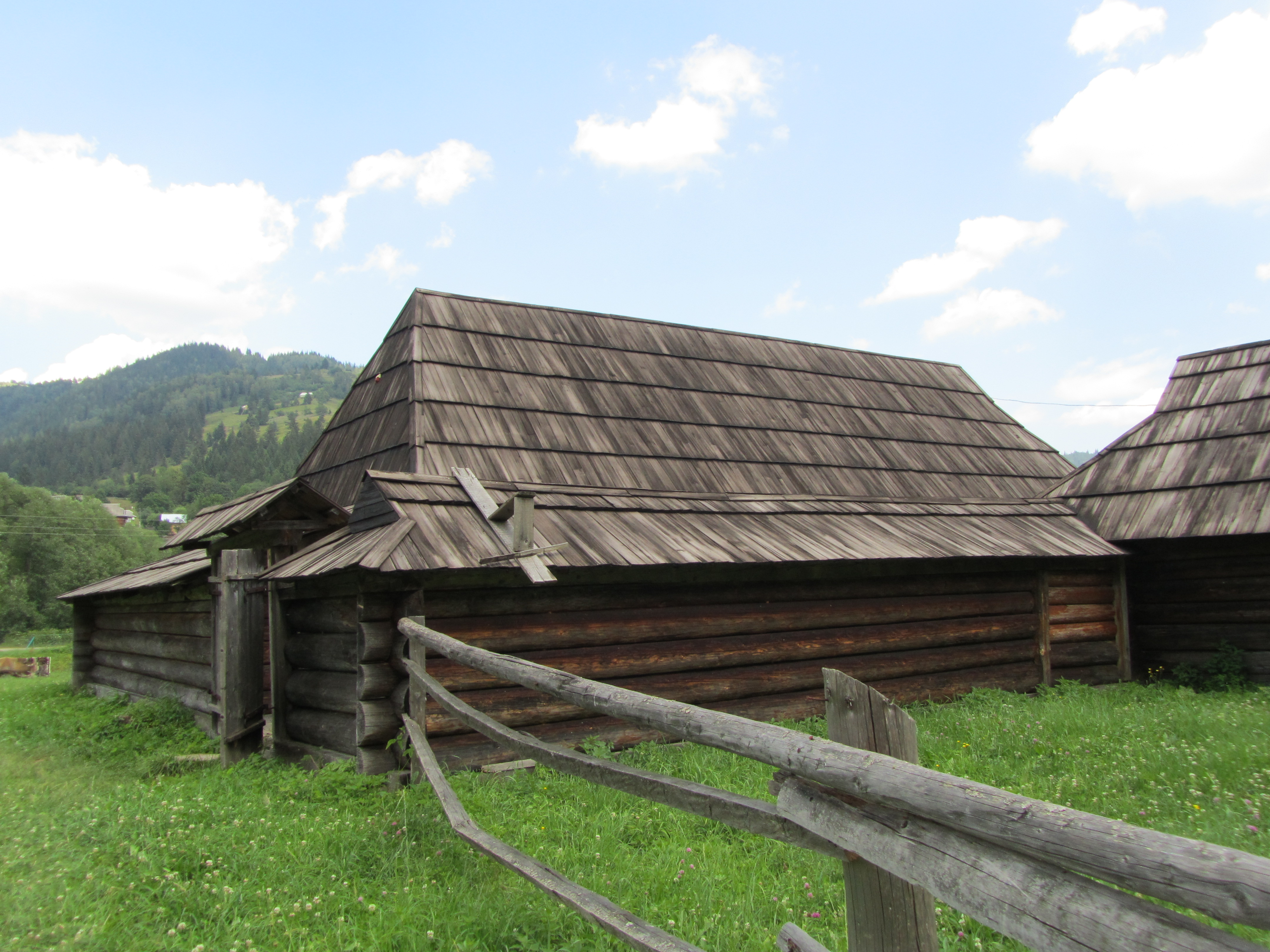 Музей «Гуцульська гражда» (село Криворівня Верховинського району Івано-Франківської області)